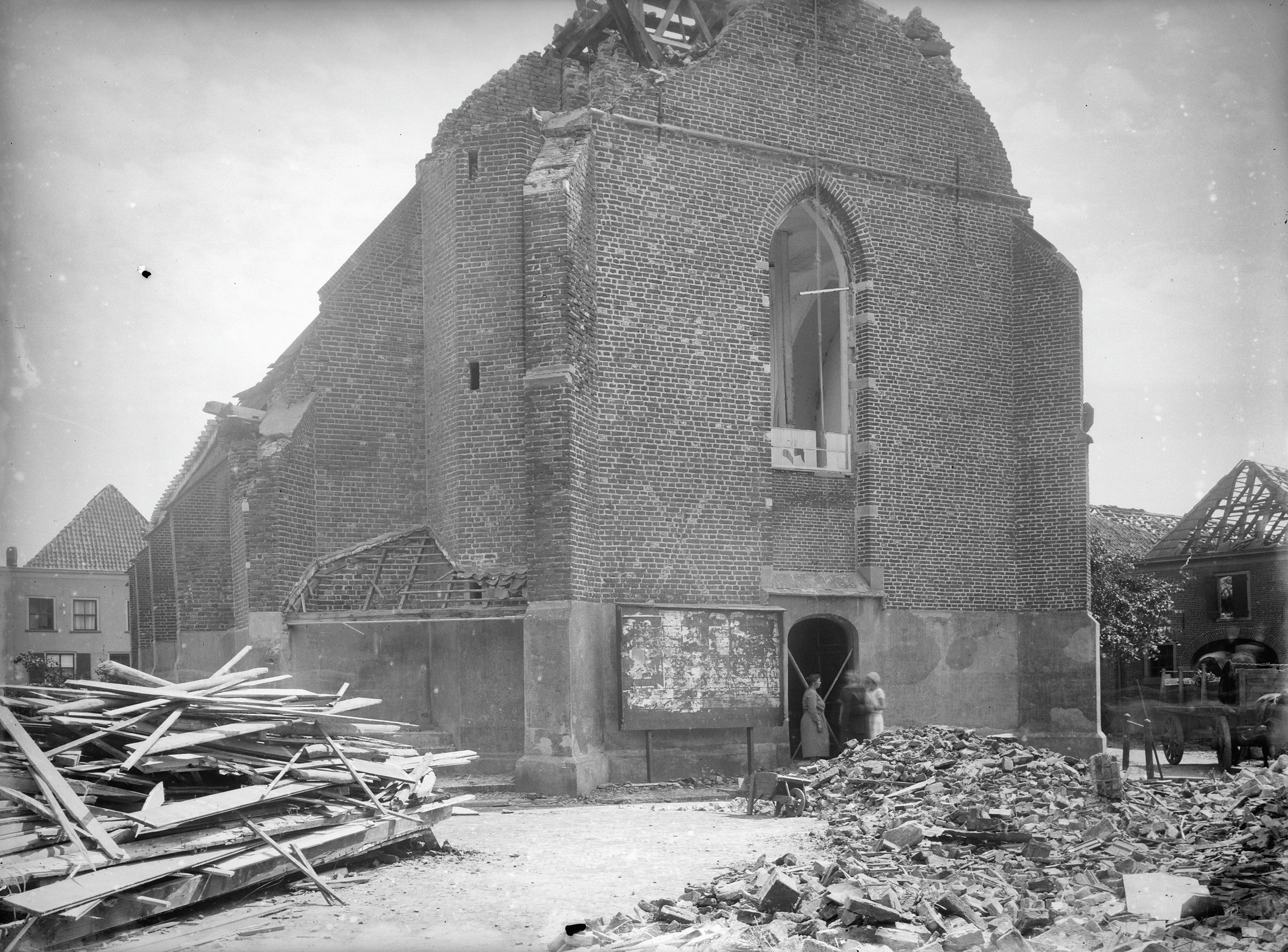 Sint Joris: De Nederlands Hervormde Kerk te Borculo naar het zuid-oosten na de cycloon